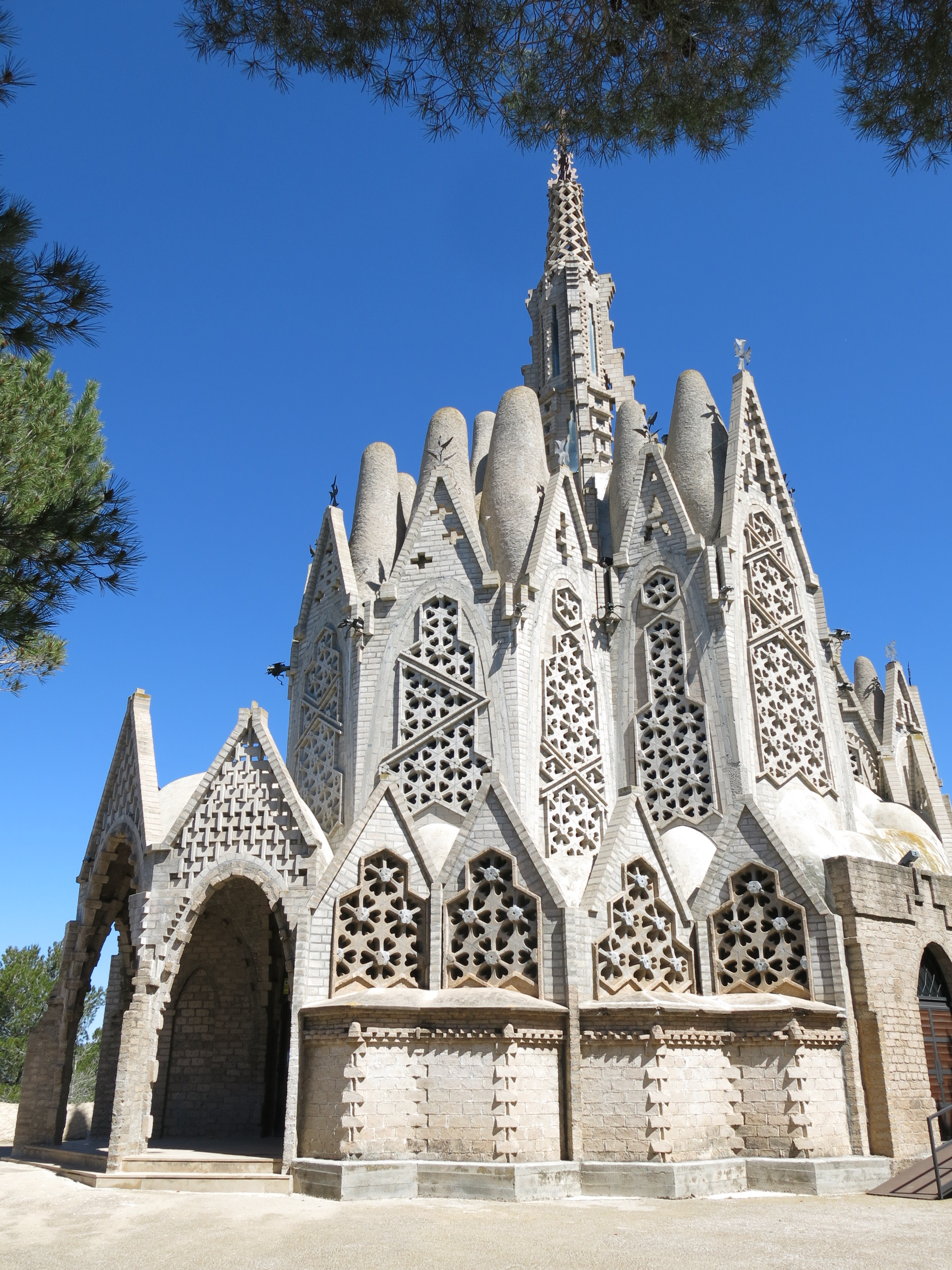 Ermita de la Mare de Déu de Montserrat (Montferri)